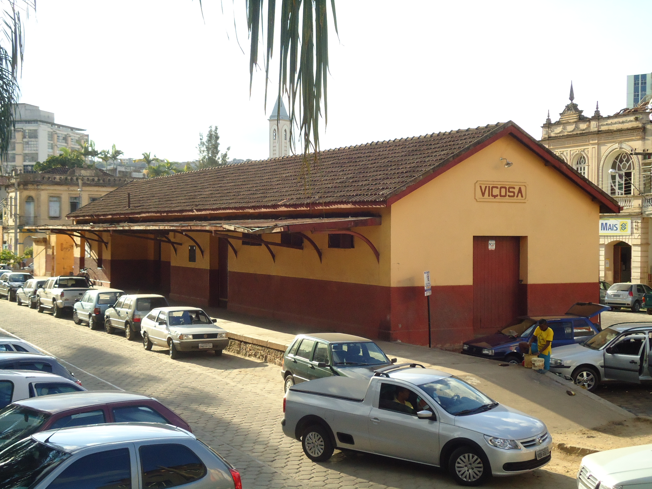 Localizada no centro, construída nos anos 1910